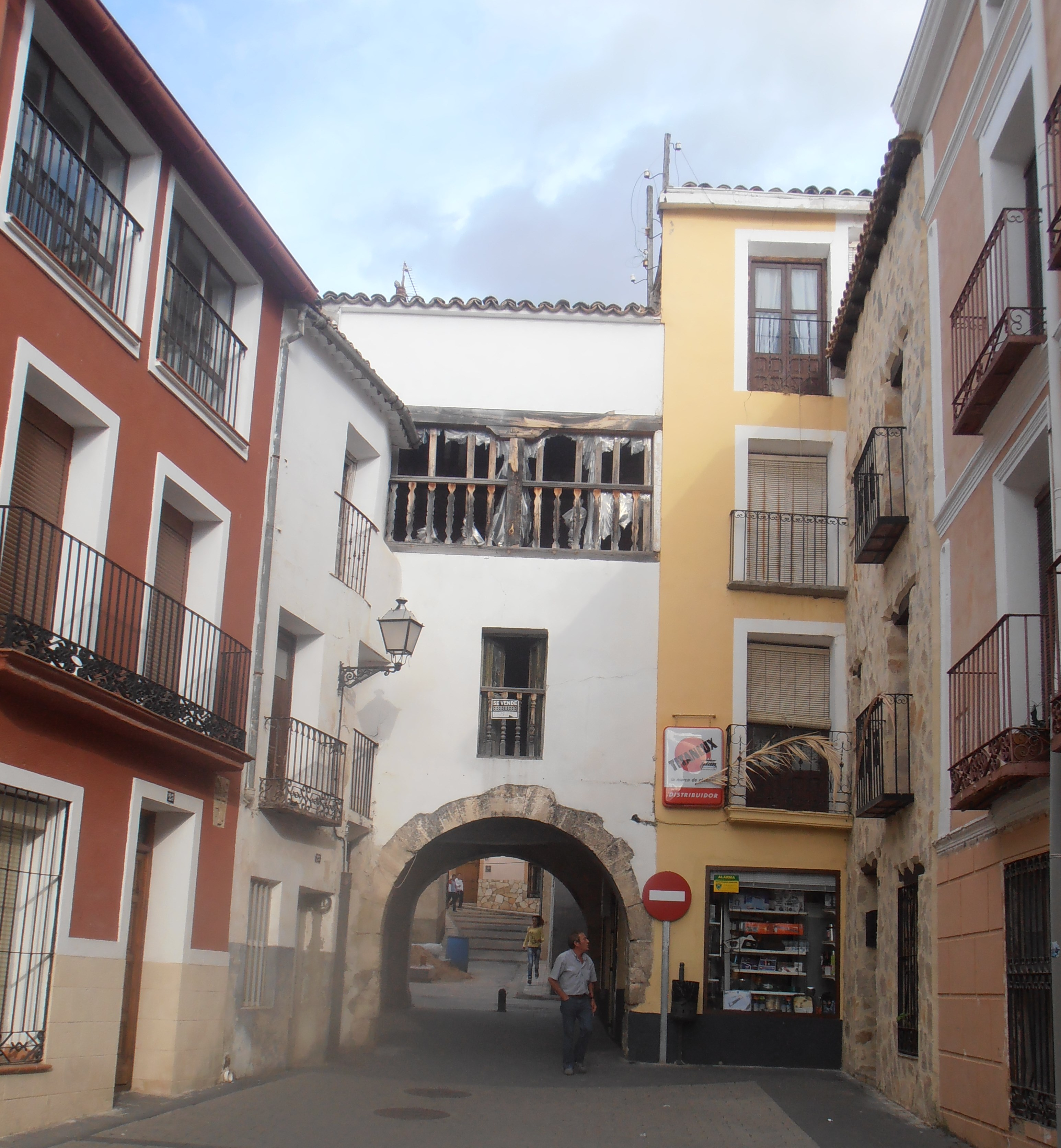 Arcada d'una carrer de Priego de Conca